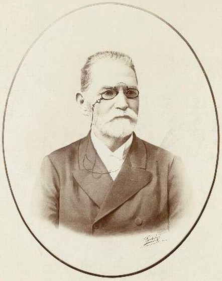 Heim Péter (1834-1904) magyar jogász, miniszteri tanácsos, 1892-1895 között postafőigazgató